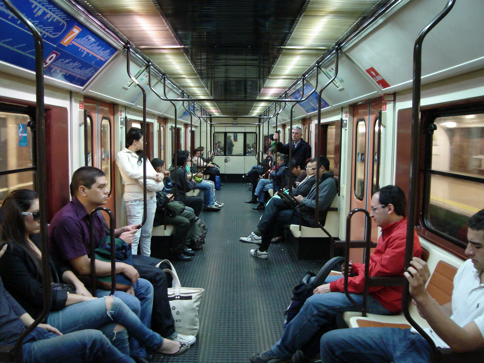 De la cuarta serie, circulando en la línea 6. Coches CAF. Diseño de 1993.